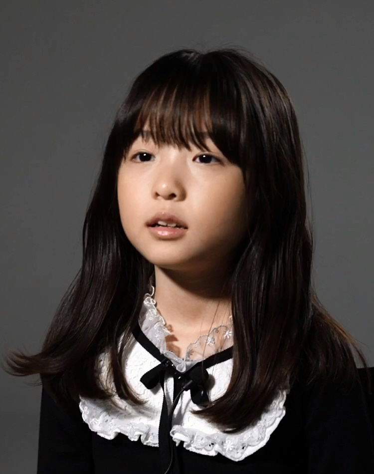 (장산범) 미스터리 열연 영상